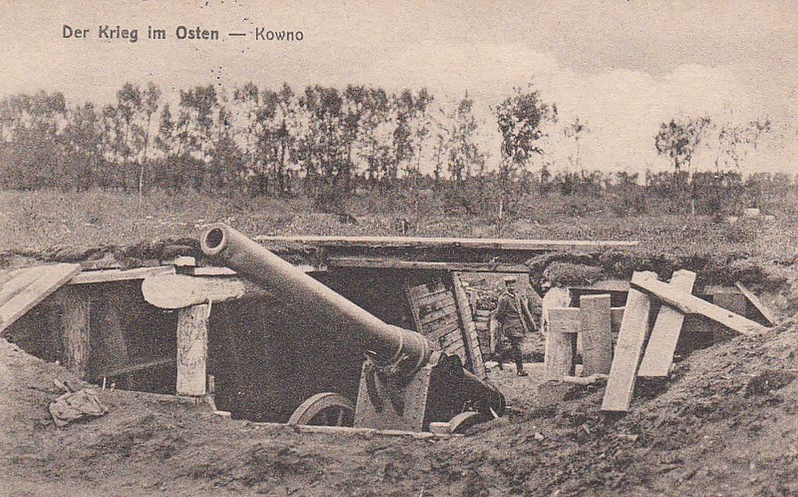 Vokiečių užgrobtas Kauno tvirtovės pabūklas lauko pozicijose, 1915 m. vasara.